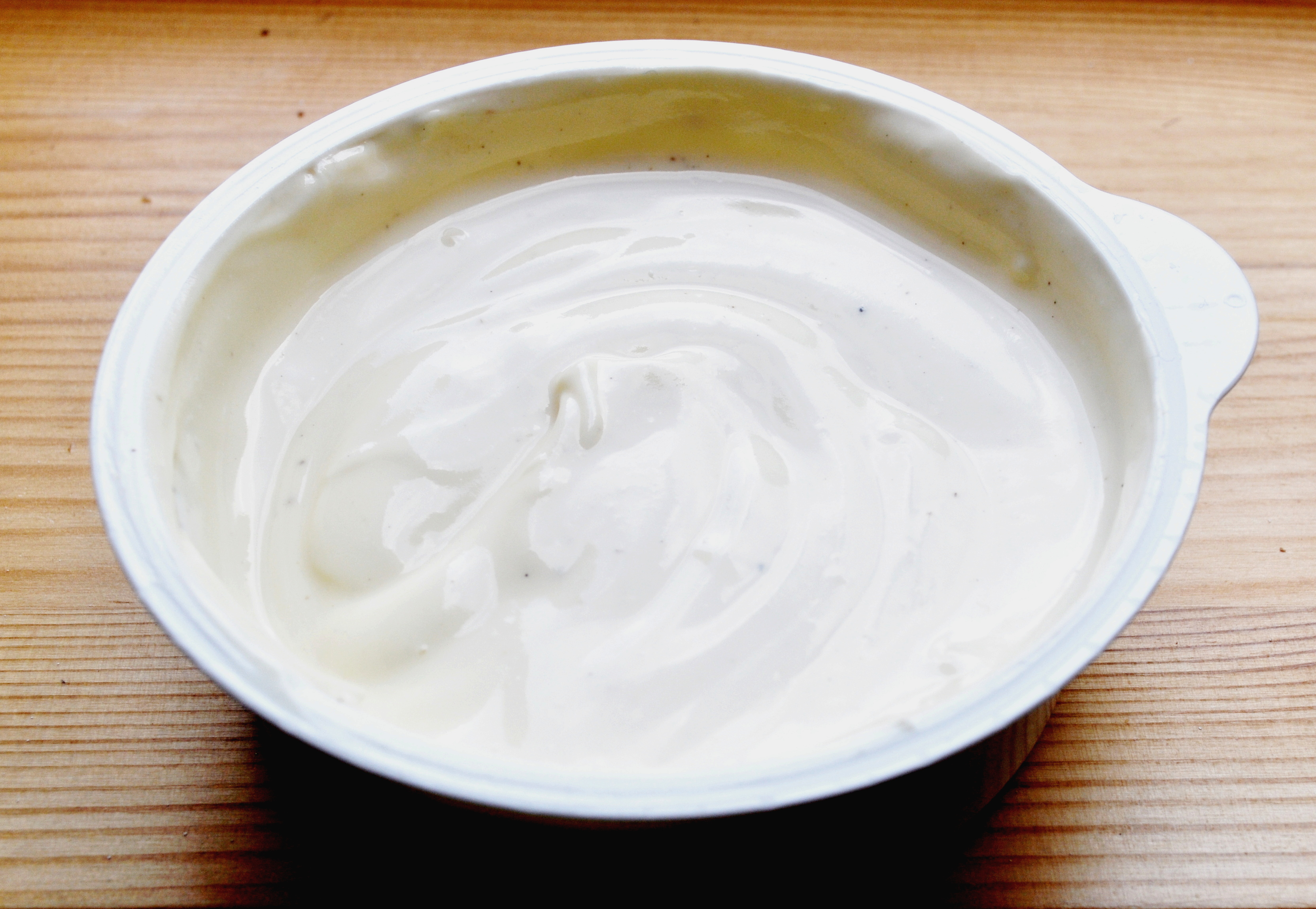 "Ravensberger Feine Quark-Creme Bourbon-Vanille" Speisequarkzubereitung mit 16% Bourbon-Vanille-Zubereitung. Dreiviertelfettstufe im Milchanteil. Zutaten: Speisequark, Joghurt aus entrahmter Milch, Zucker, Glukose-Fruktose-Sirup, Wasser, modifizierte Stärke, gemahlene Vanilleschoten, Pektin, Guarkernmehl, natürliches Vanillearoma, Beta-Carotin